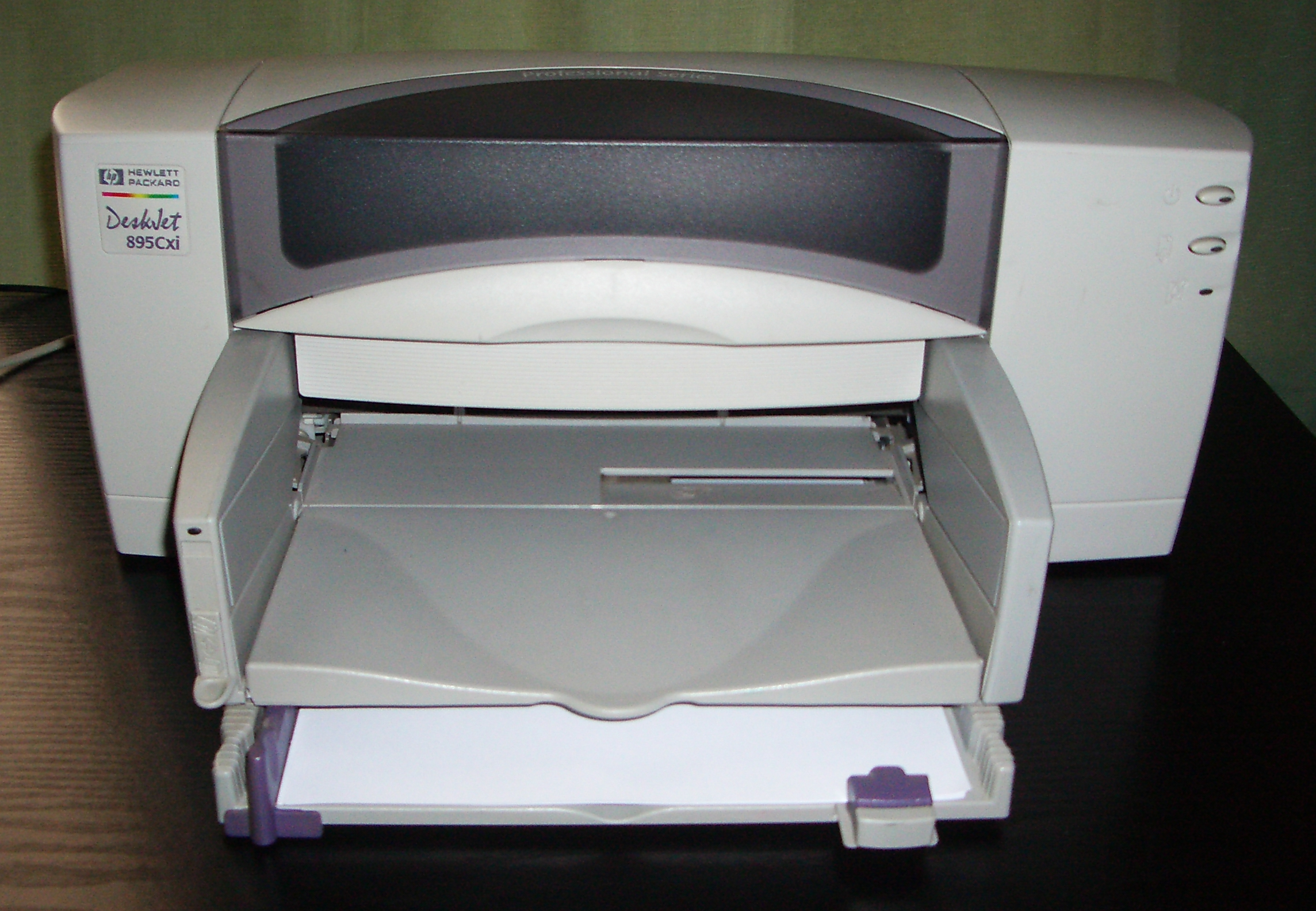 Hewlett-Packard DeskJet 895Cxi colour inkjet printer